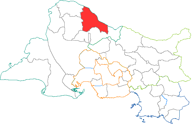 Situation du canton dans le département des Bouches du Rhône (France)